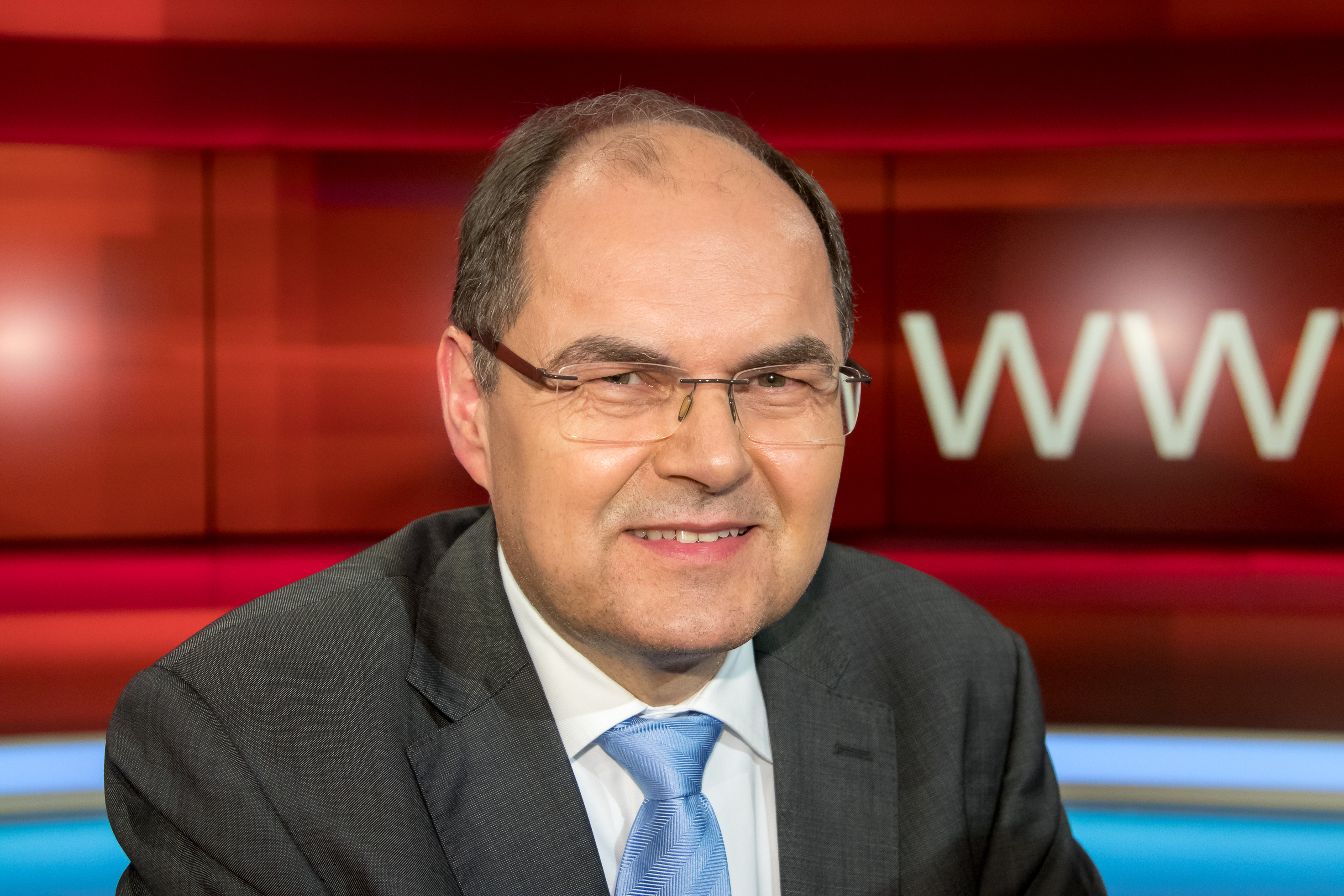 Christian Schmidt (CSU) in der WDR-Sendung "hart aber fair" am 4.12.2017